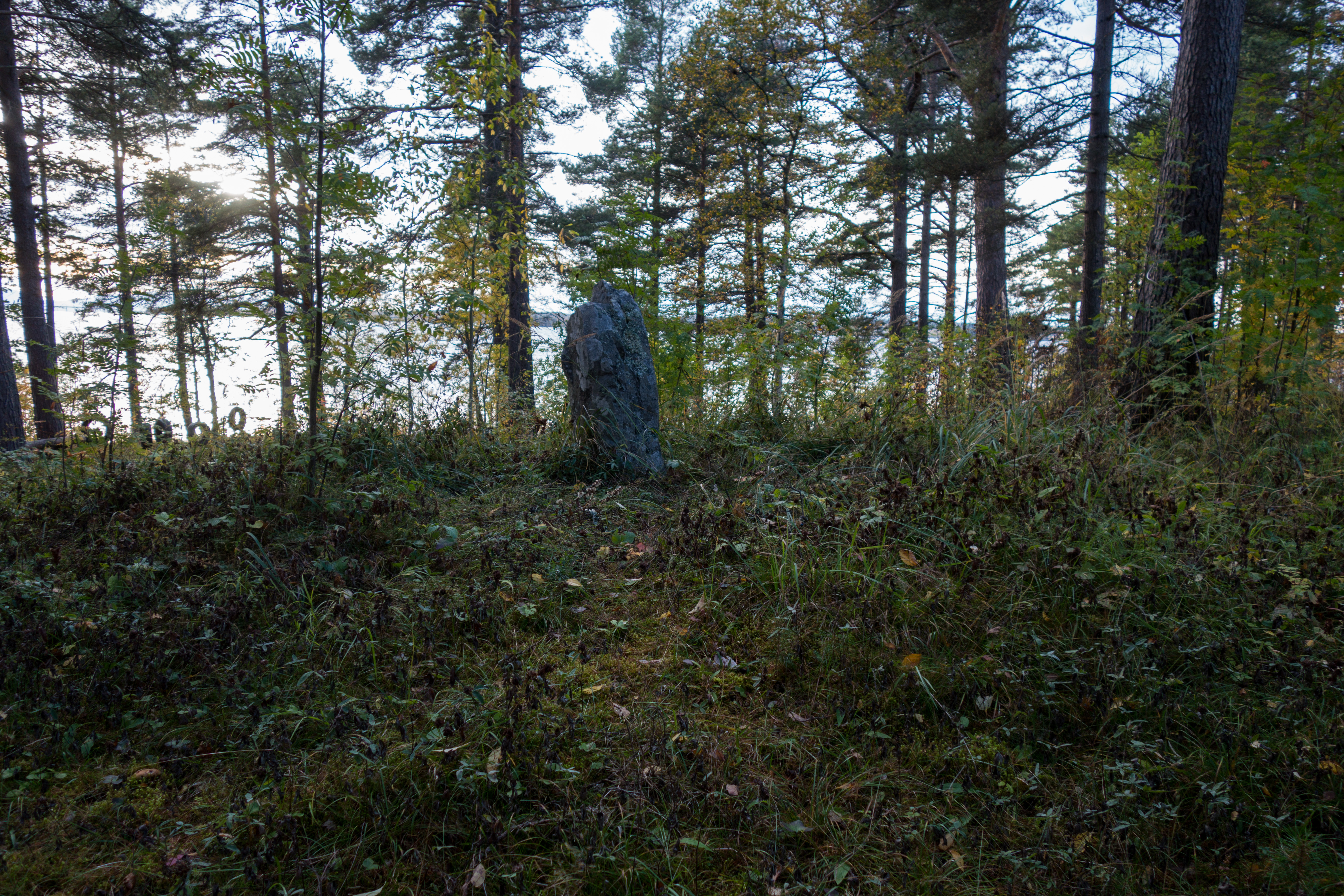 Ås 13:1 Kullen med stenen är en Vikingagrav från 900-talet